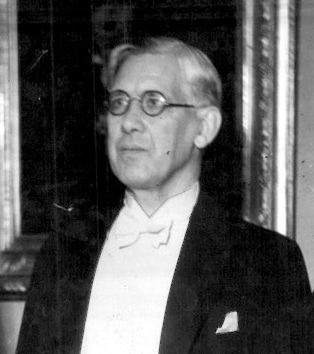 Juristprofessorer Phillips Hult.